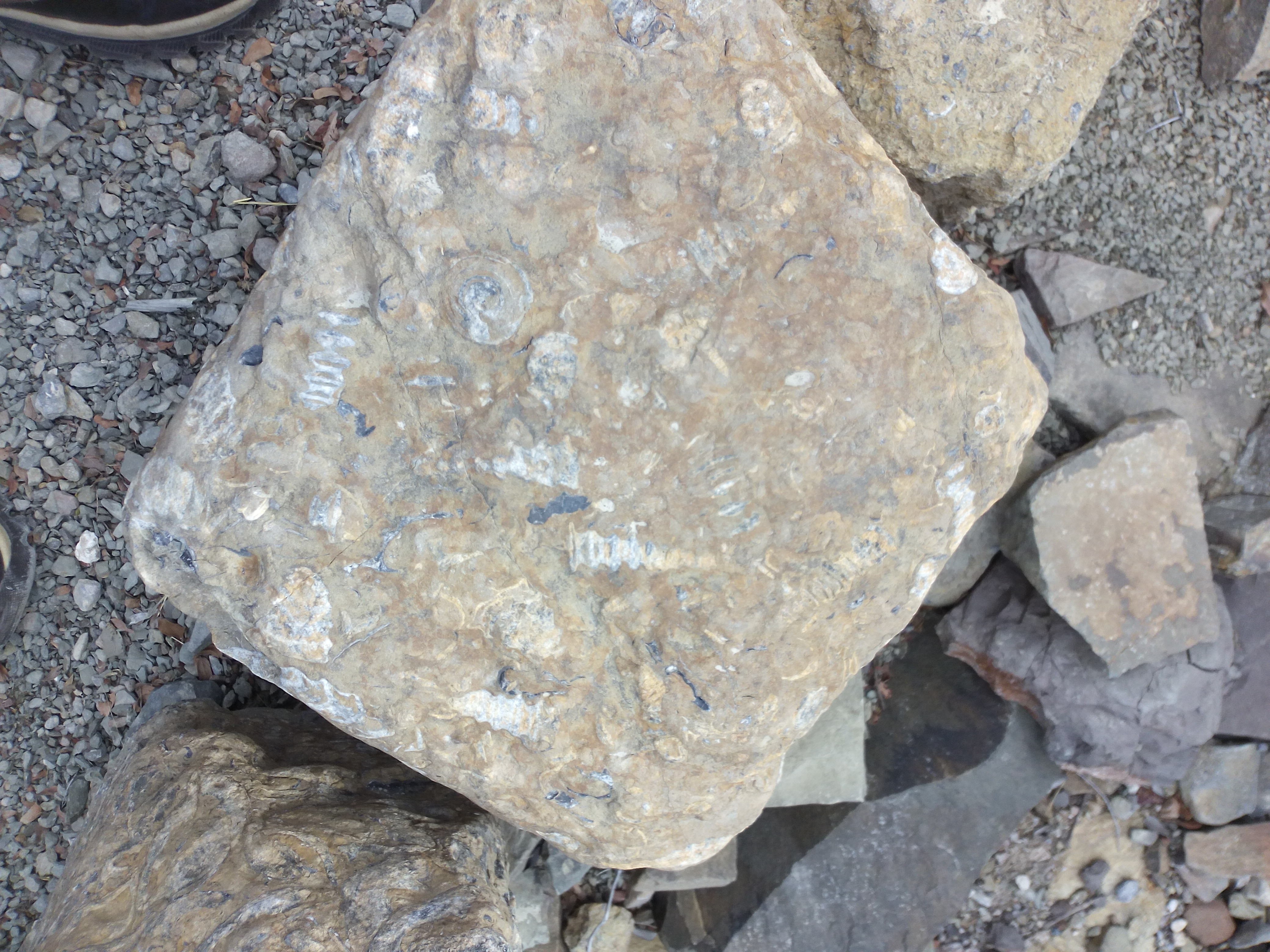 Fósiles conocidos como turritelas, encontrados en la localidad de San Juan Raya